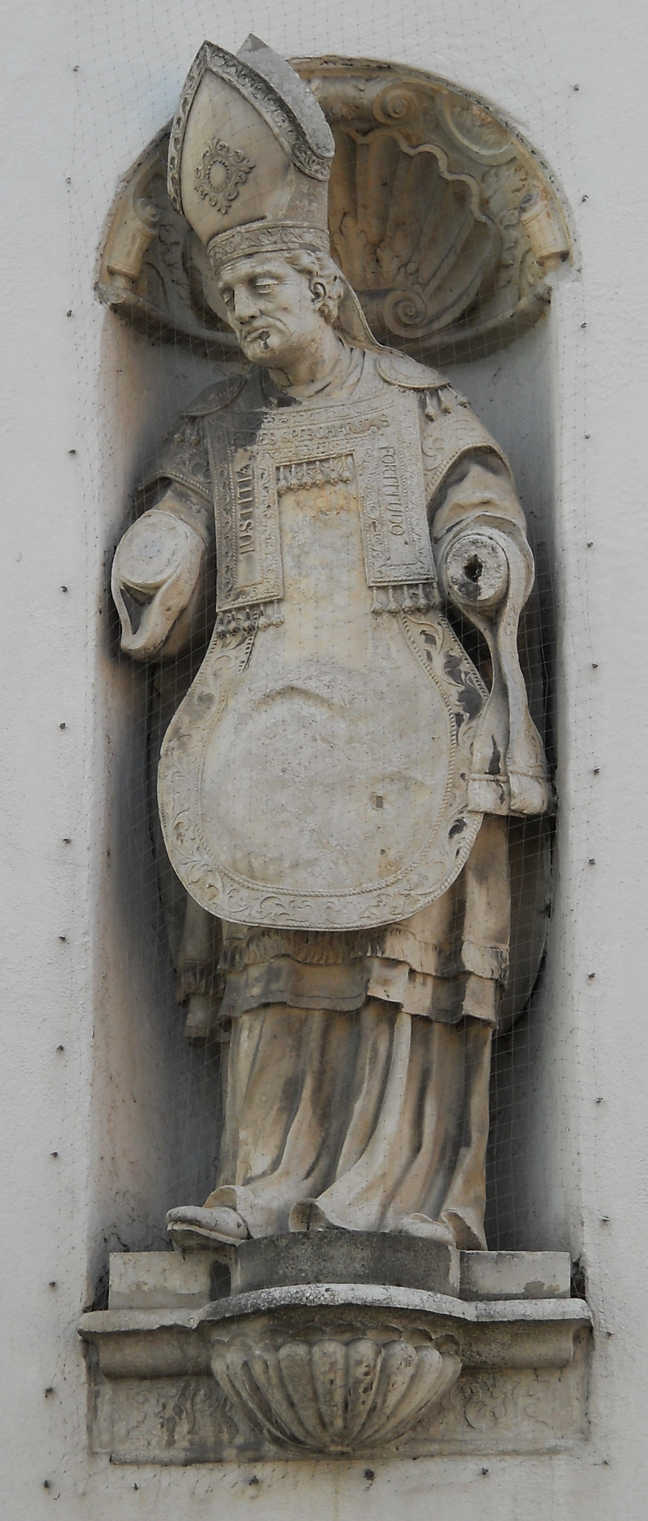 Figur des hl. Willibald an der Fassade der Spitalkirche von Eichstätt von dem Barock-Bildhauer Christian Handschuher, Ende 17., Anfang 18. Jahrhundert